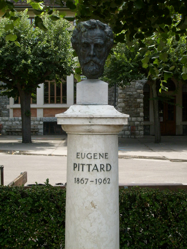 Buste d'Eugène Pittard devant le Musée d'ethnographie de Genève (Suisse)